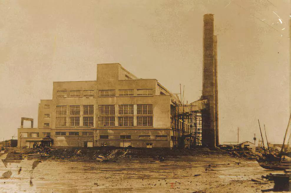 青岛四方发电所汽机房全貌